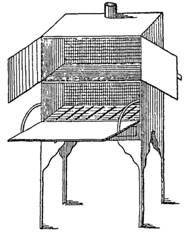 Grude-Ofen aus einer Berliner Fabrik anno 1888